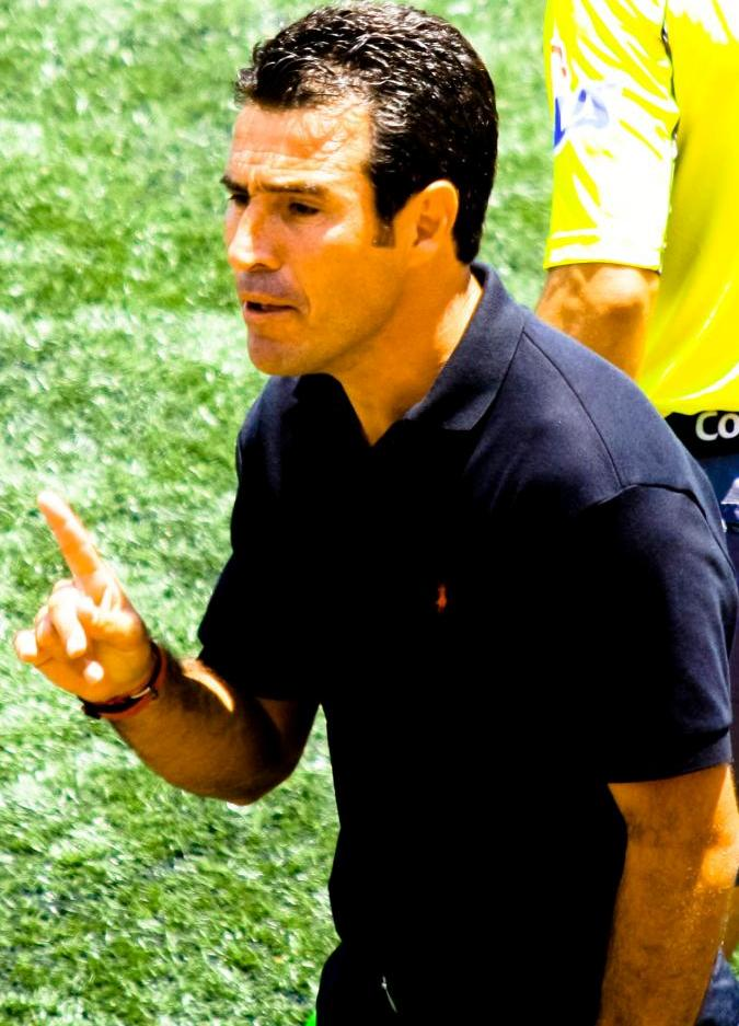 xolos vs altamira en el estadio caliente, apertura 2010 liga de ascenso del futbol mexicano, mas info y videos en